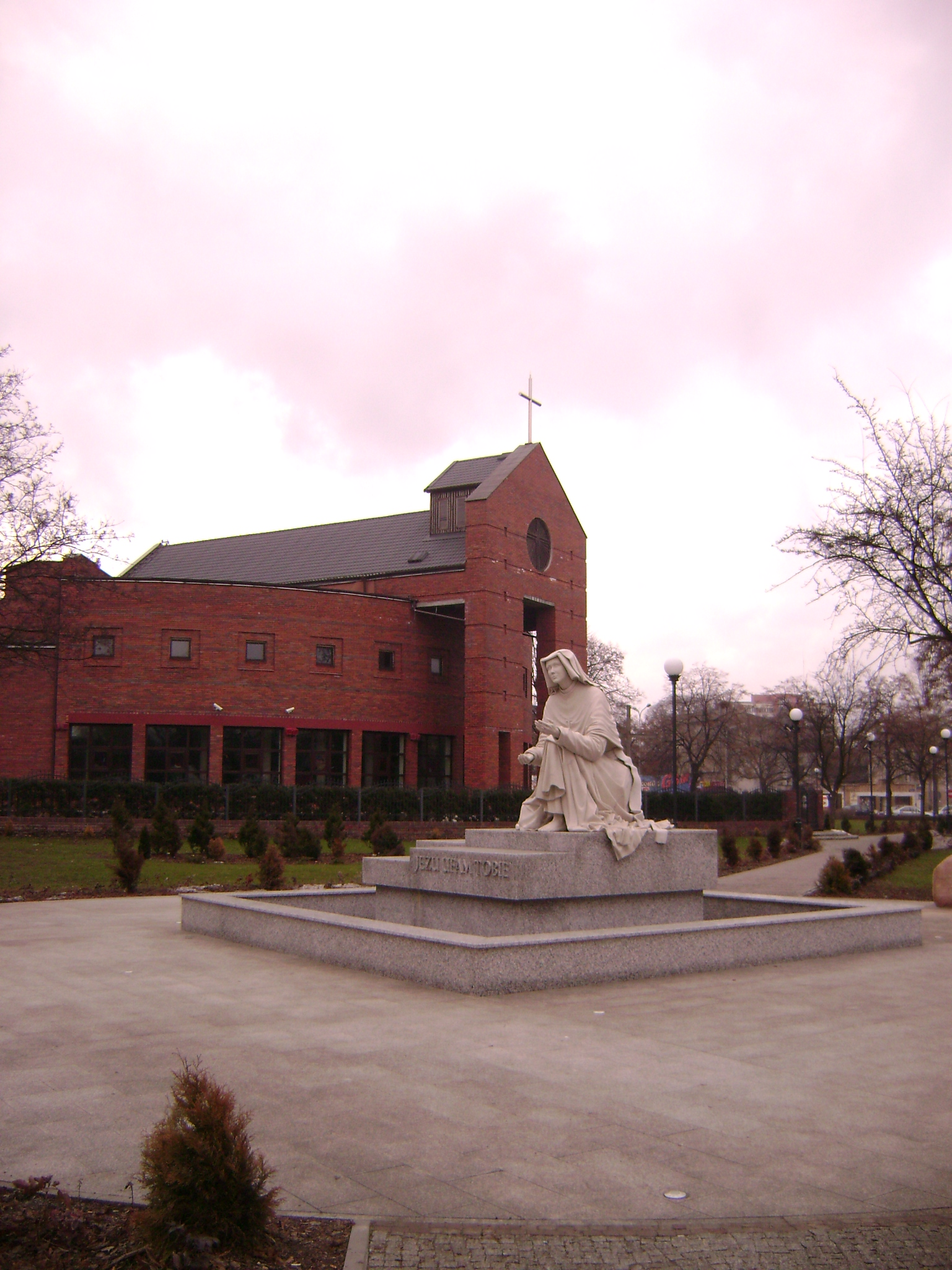 Pomnik św. Faustyny Kowalskiej na placu Niepodległości. W tle kościół patronki Łodzi.